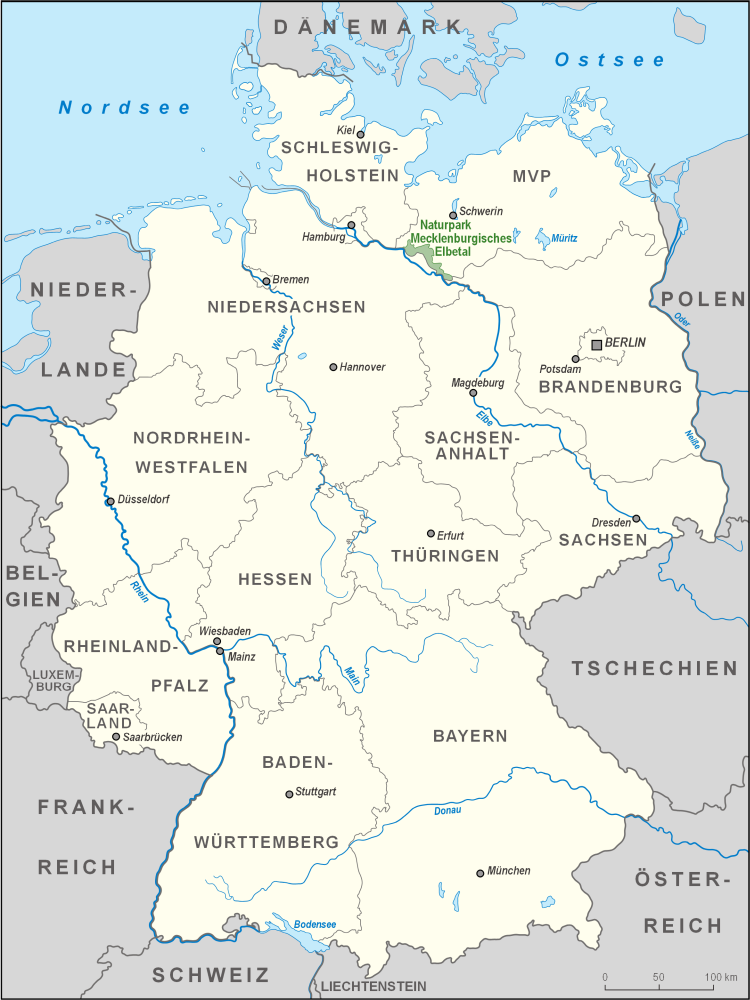 Karte des Naturparks Mecklenburgisches Elbetal in Deutschland